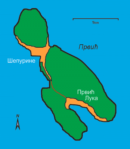 Карта острва Првића у Далмацији.